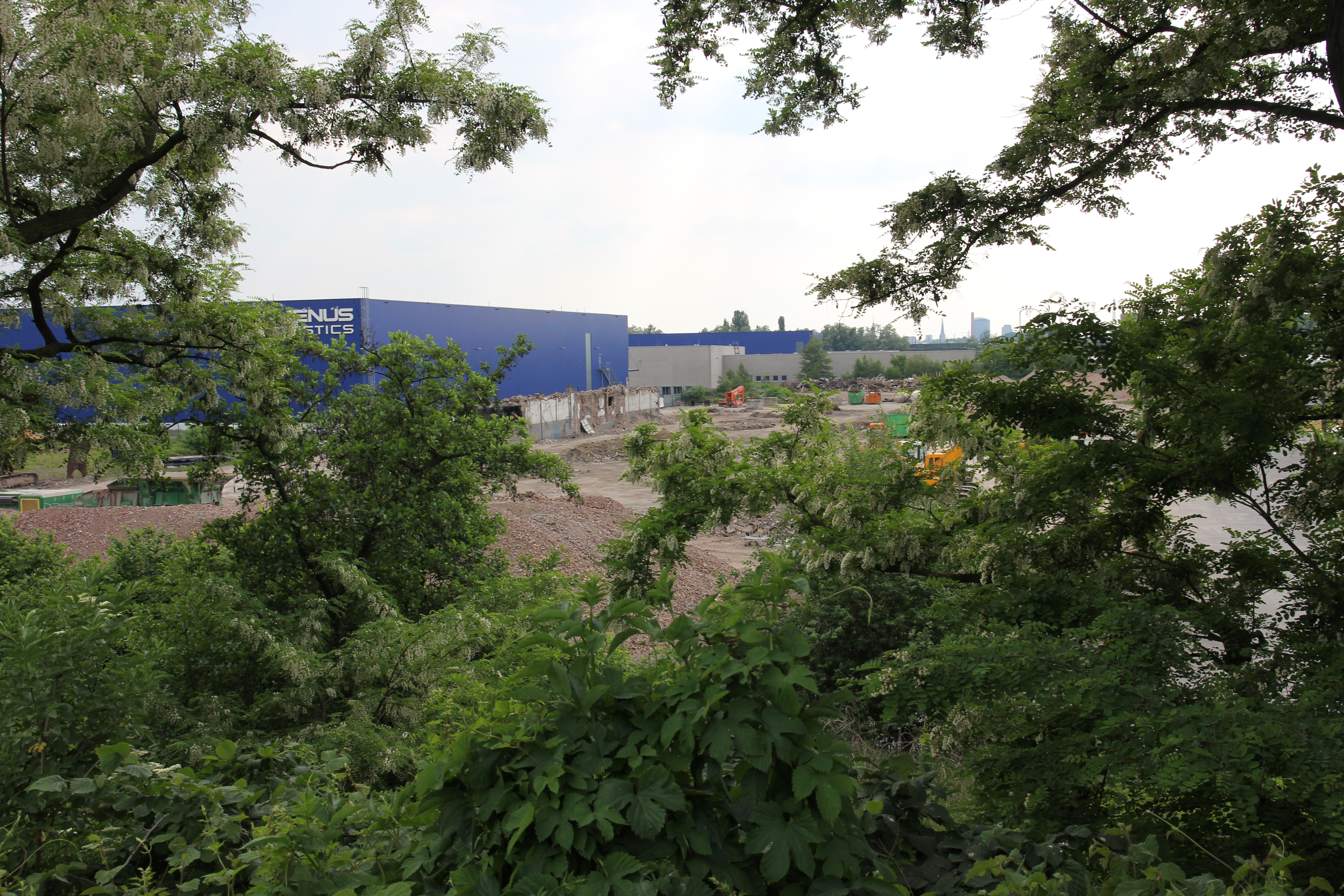 Gelände des ehemaligen Dortmunder Stahlbauunternehmens Jucho. Die letzte Halle wird gerade abgebrochen.